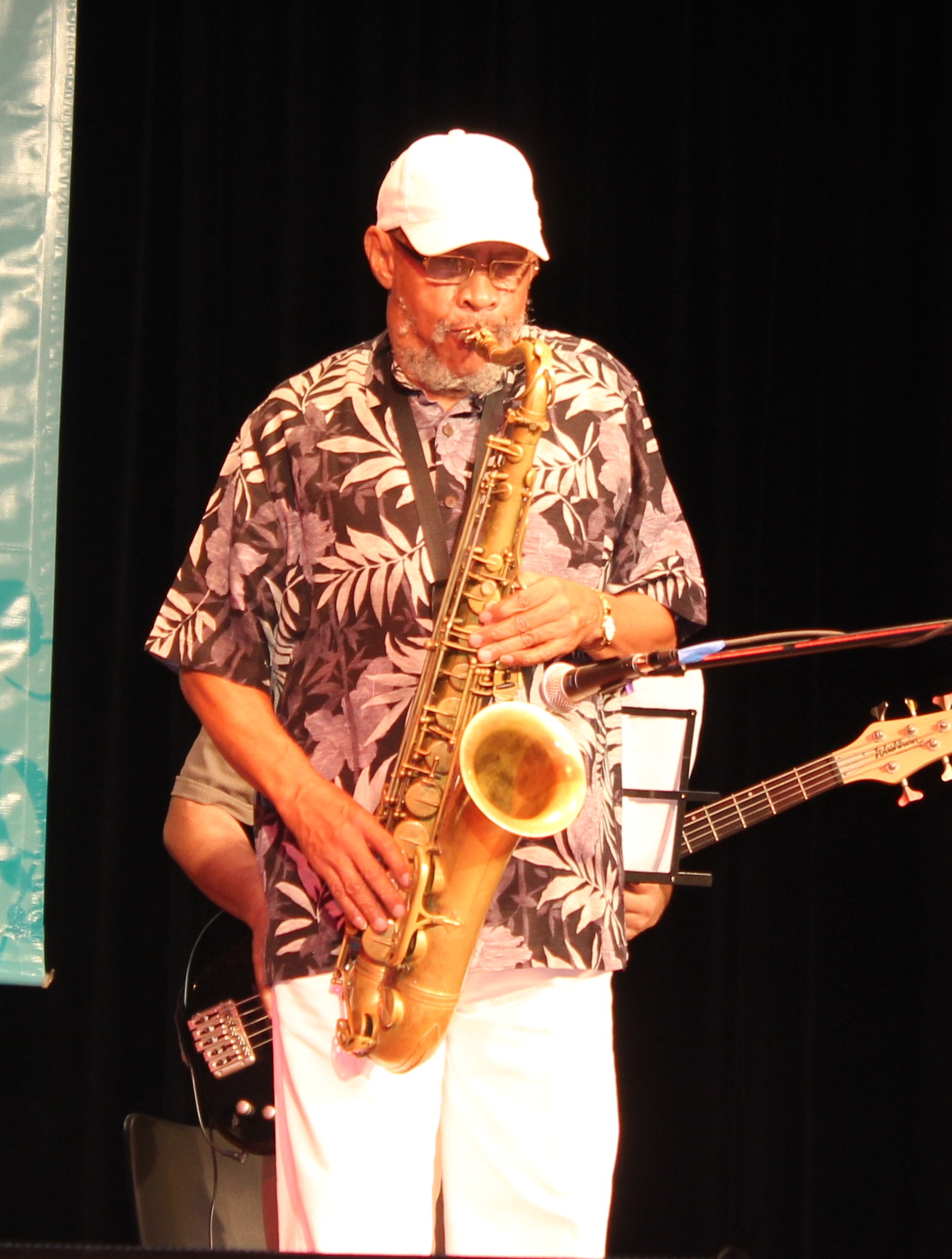 Carlos Garnett, Saxofonista Panameño